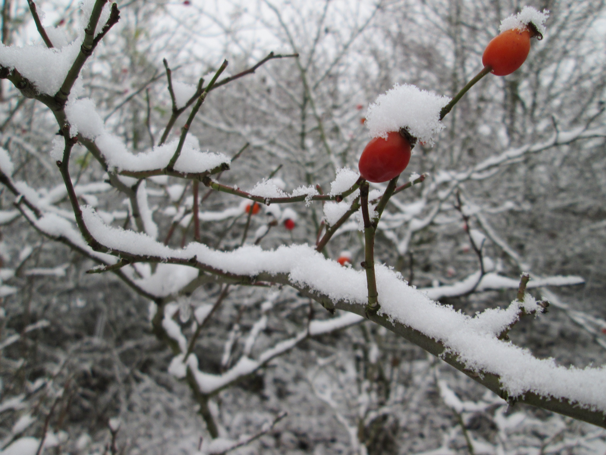 Hunds-Rose (Rosa canina) an der A61 bei Hockenheim bei Neuschnee am 3. Dezember 2017